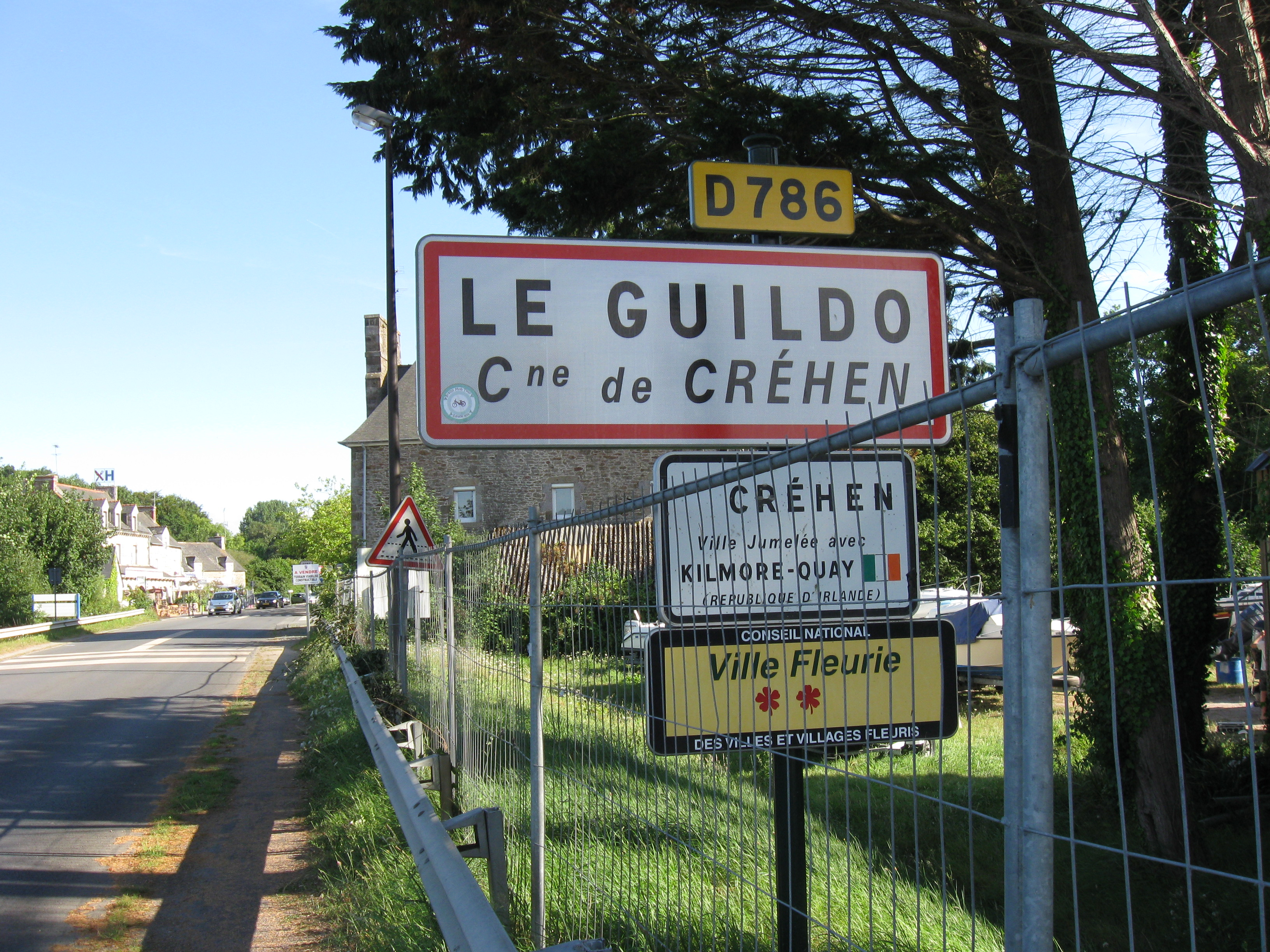 Village du Guildo, panneau. (Créhen, Côtes-d'Armor, région Bretagne).